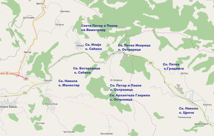 Manastiri i crkve na prostoru Sićevačke klisure.